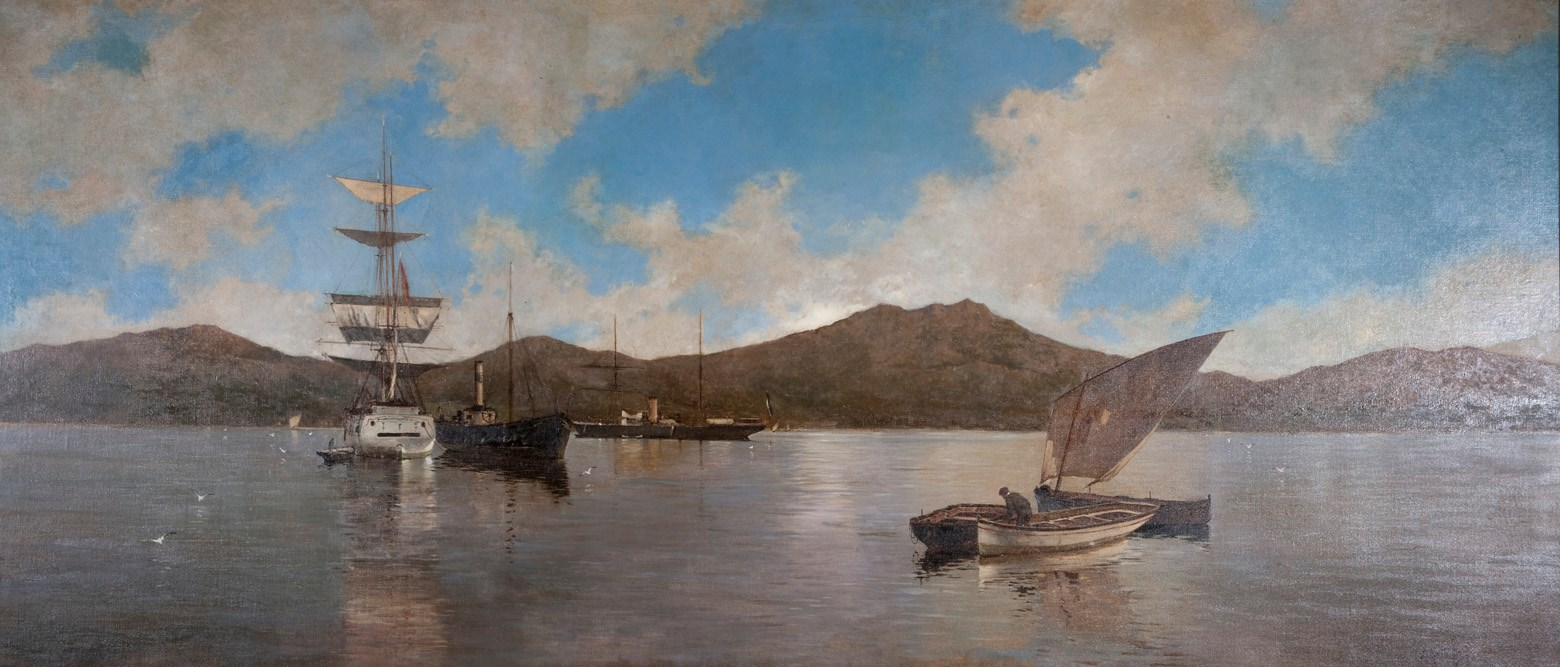 Vexa o título e as categorías.